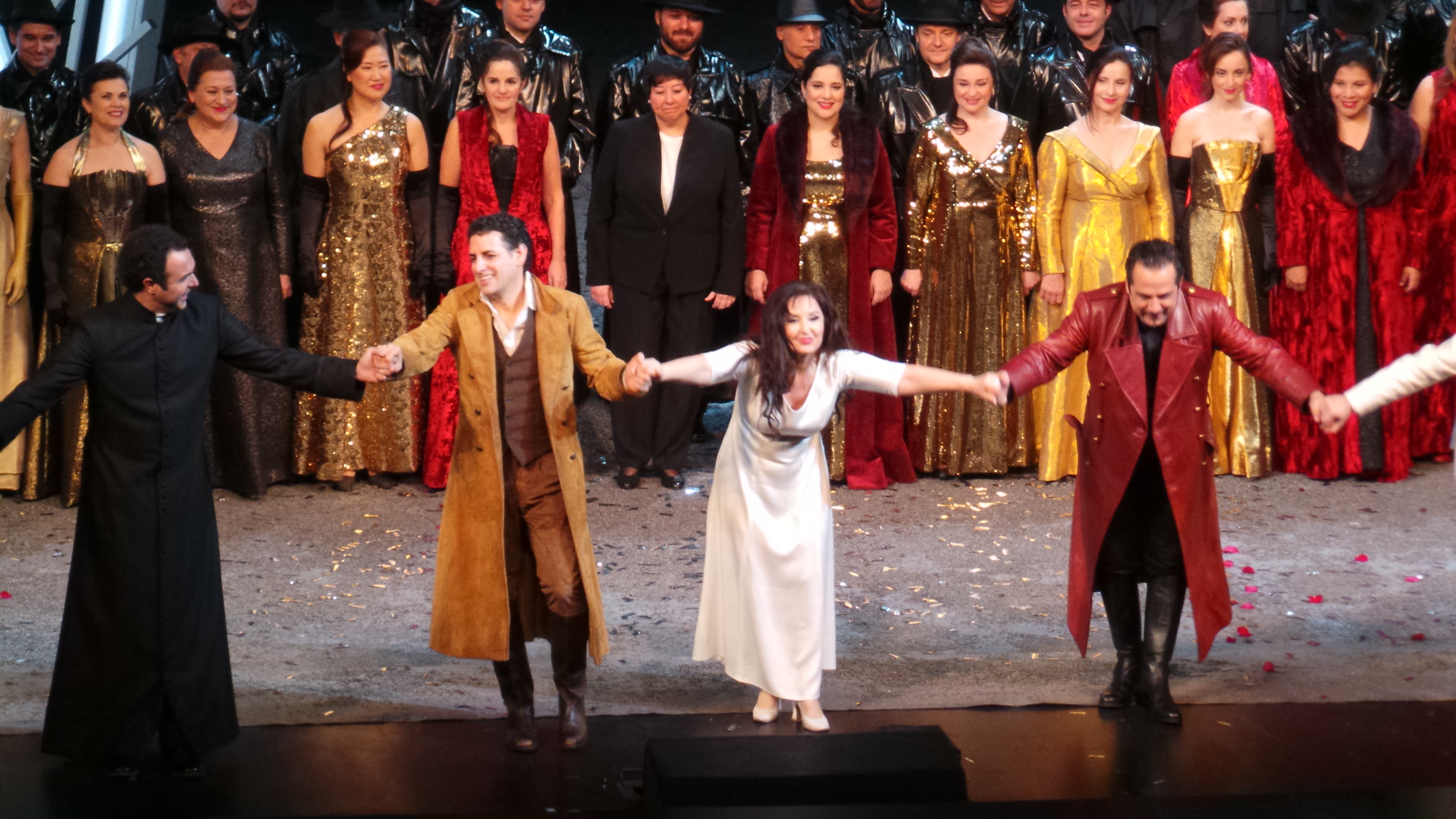 "Lucia di Lammermoor" de Donizetti en el Gran Teatre del Liceu de Barcelona. Diciembre de 2015